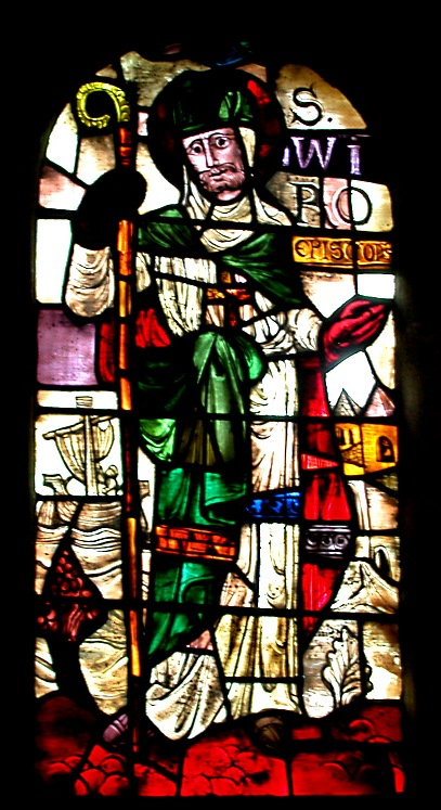 Витраж работы Николя (изображение св. Виро) в соборе Санкт Одилиенберга